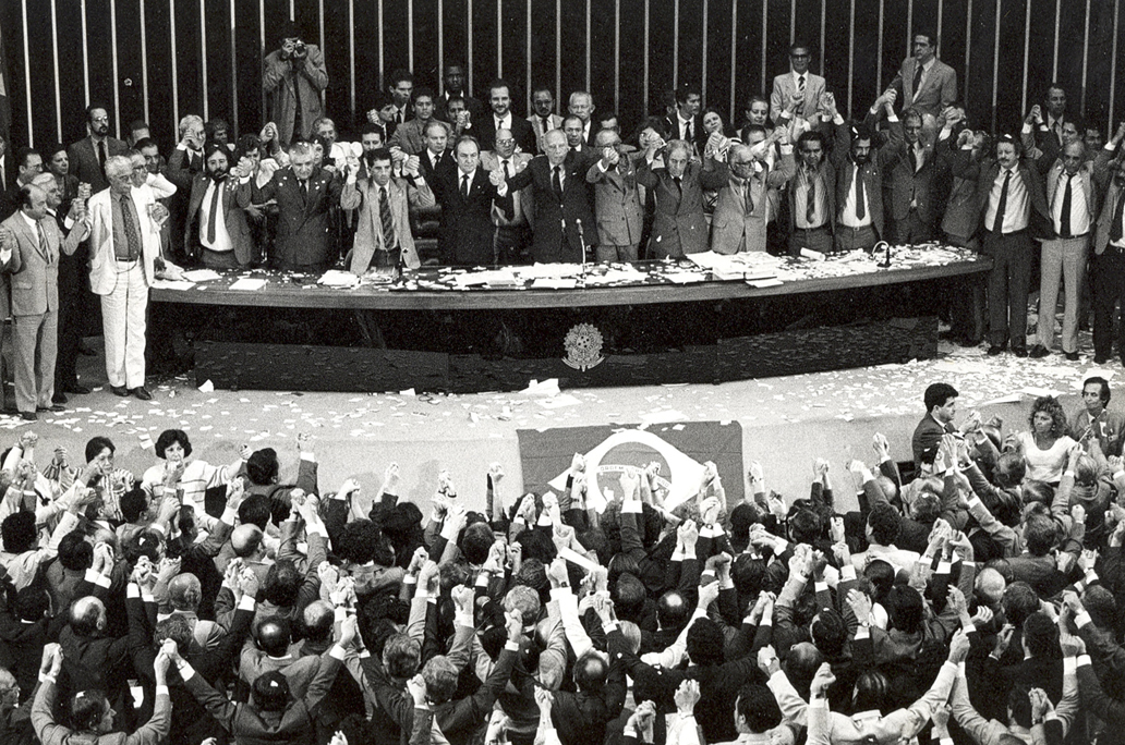 22/09/1988 - Encerramento das votações da nova carta constitucional, com o discurso do Presidente da Assembleia Nacional Constituinte (ANC) Deputado Ulysses Guimarães. No dia 22 de setembro, o plenário da ANC, na 1.021ª votação, aprova o Projeto de Constituição. Foto: Arquivo/Senado Federal